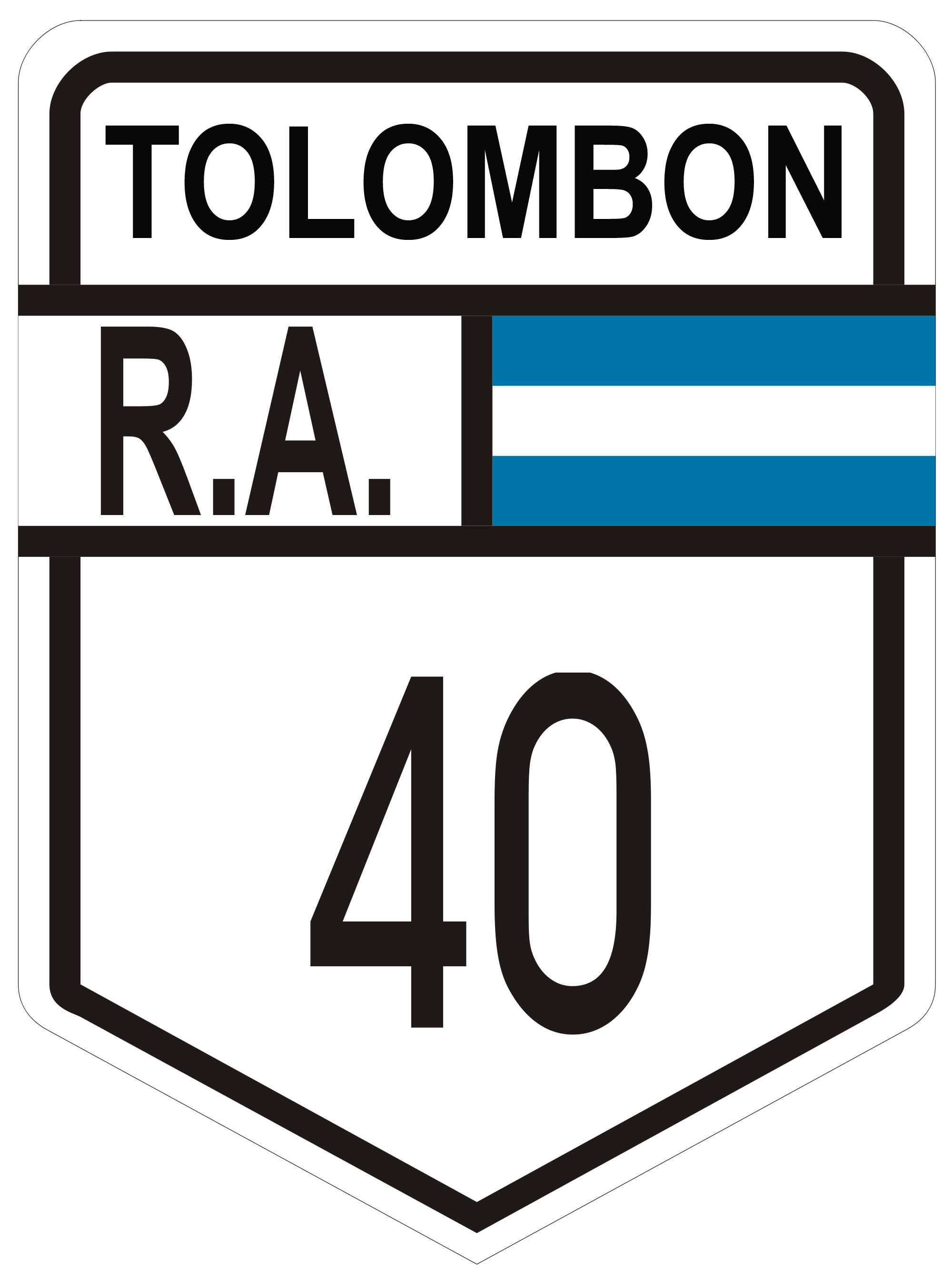 Tolombón - RN40